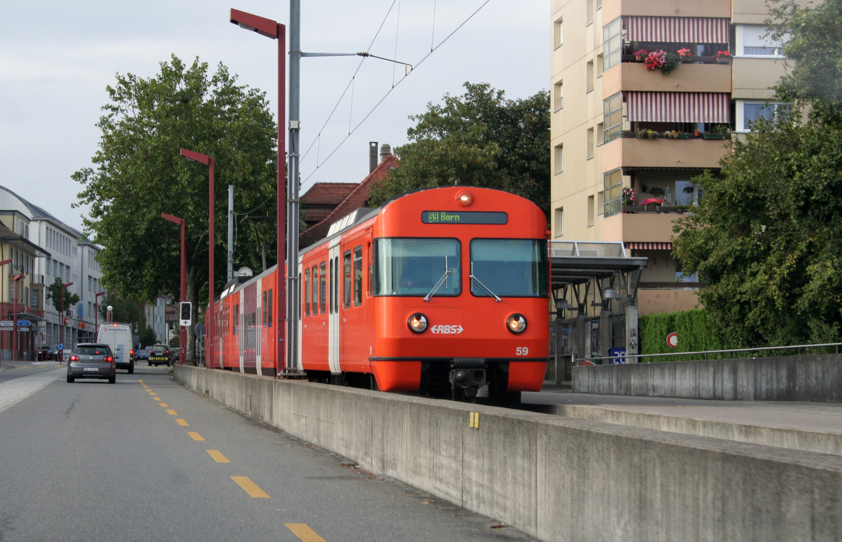 RBS Be 4/12 59 als S9 in Unterzollikofen